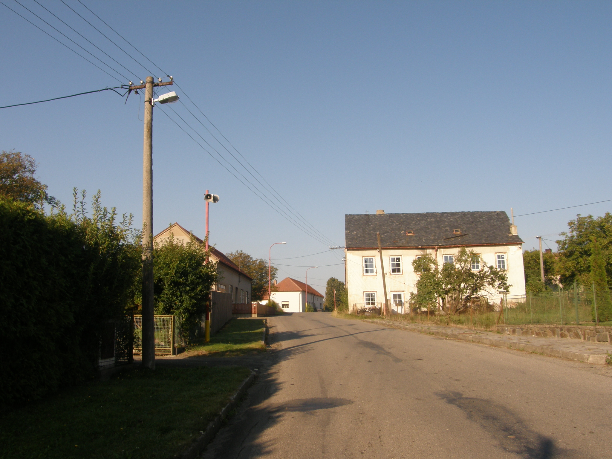 Roztání, okres Prostějov